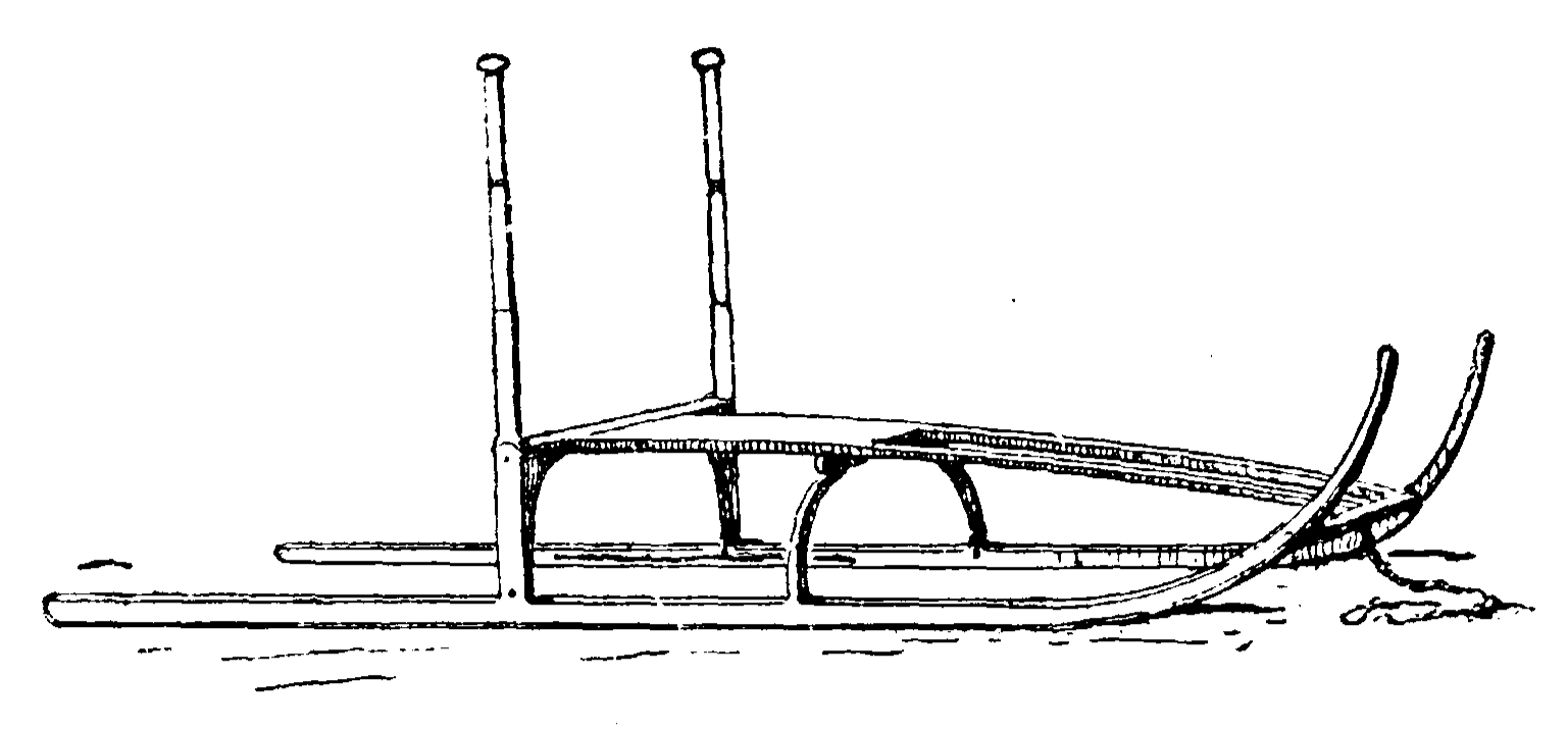 Sparkstötting. Bild från Nordisk Familjebok, band 15, sp 557, Uggleupplagan. Artikeln "Kälkåkning".